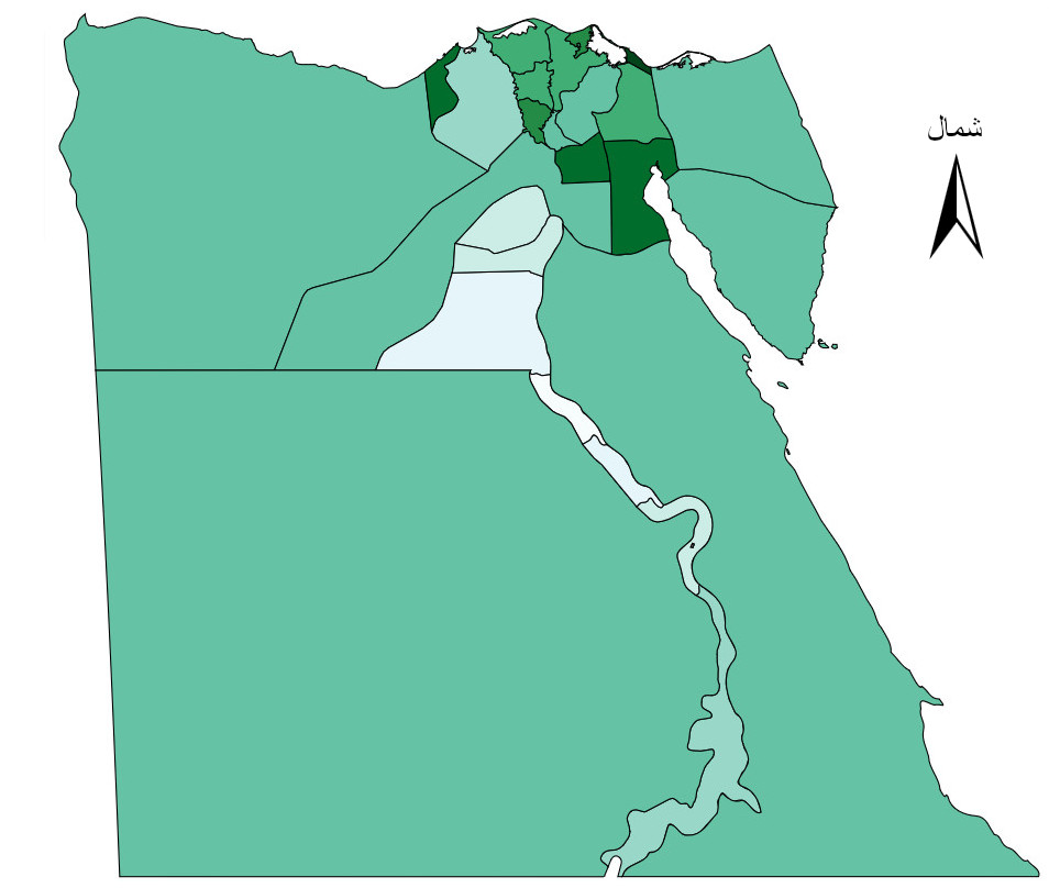 محافظات مصر حسب مؤشر التنمية البشرية